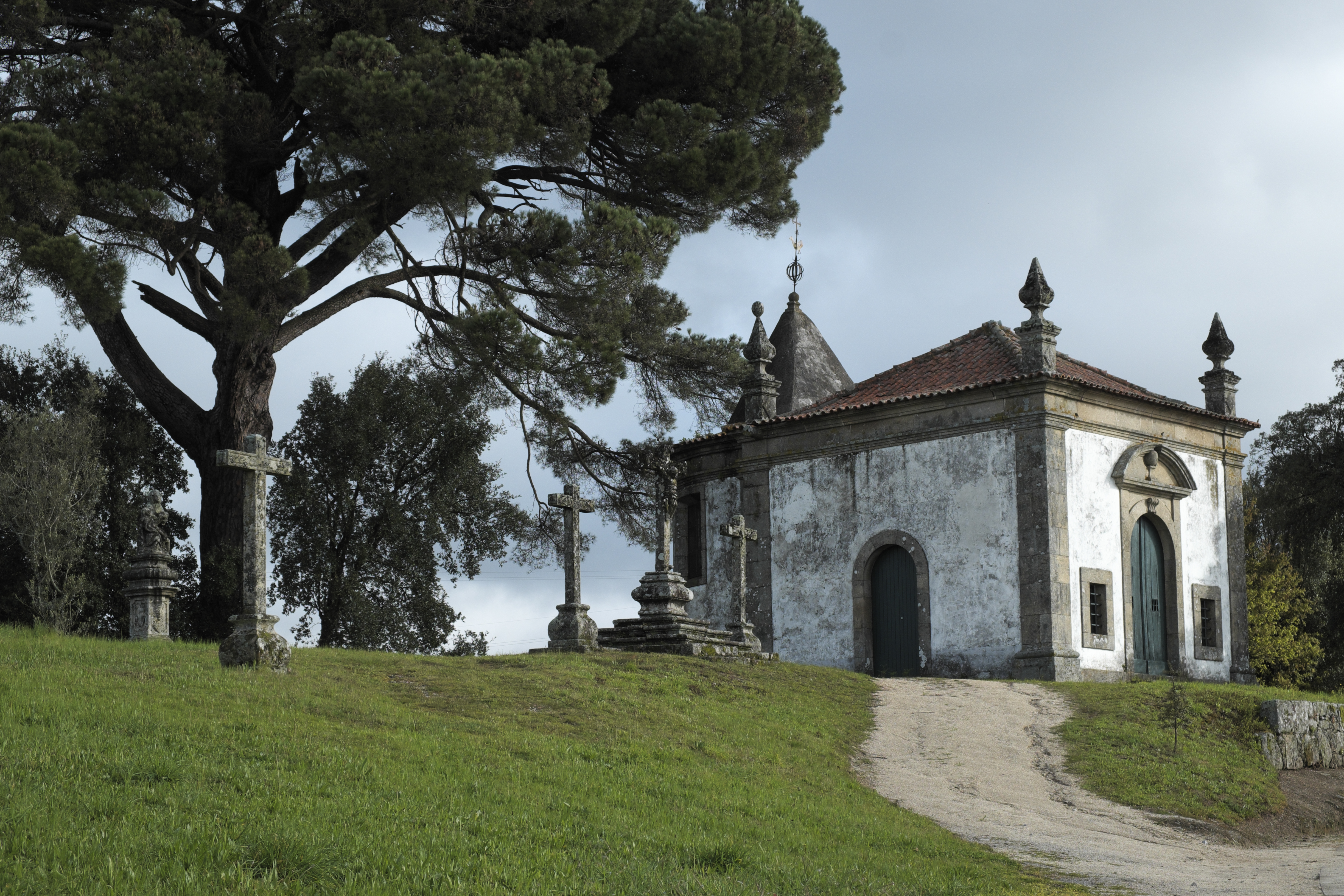 Caramos, einem zur Stadt Felgueiras gehörenden Ort im Distrikt Porto in Nordportugal